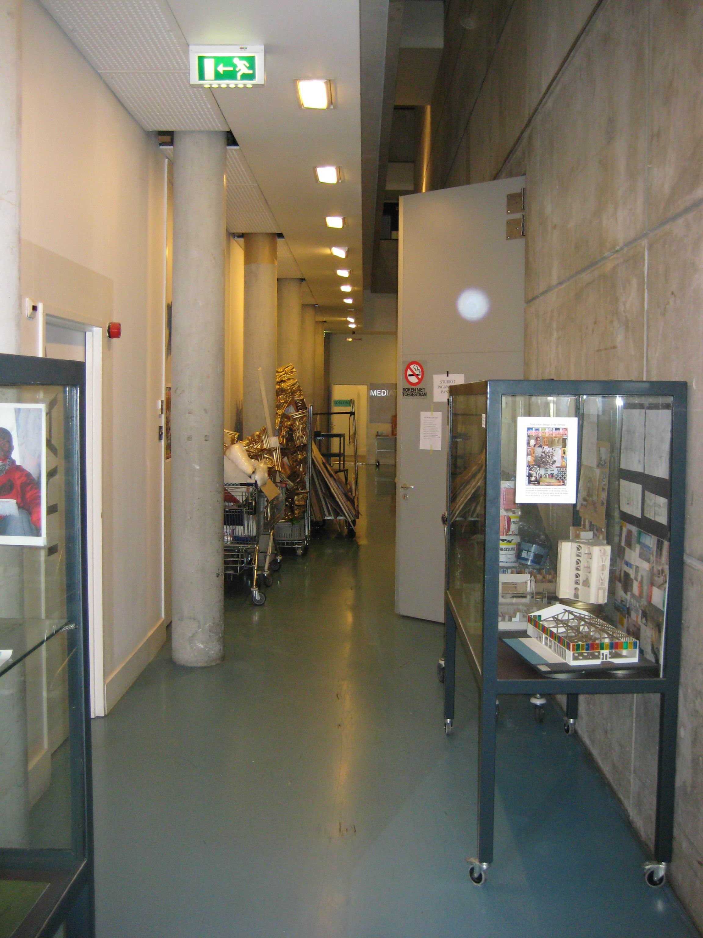 NFTA